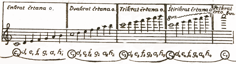 Uporabnik:lanfra